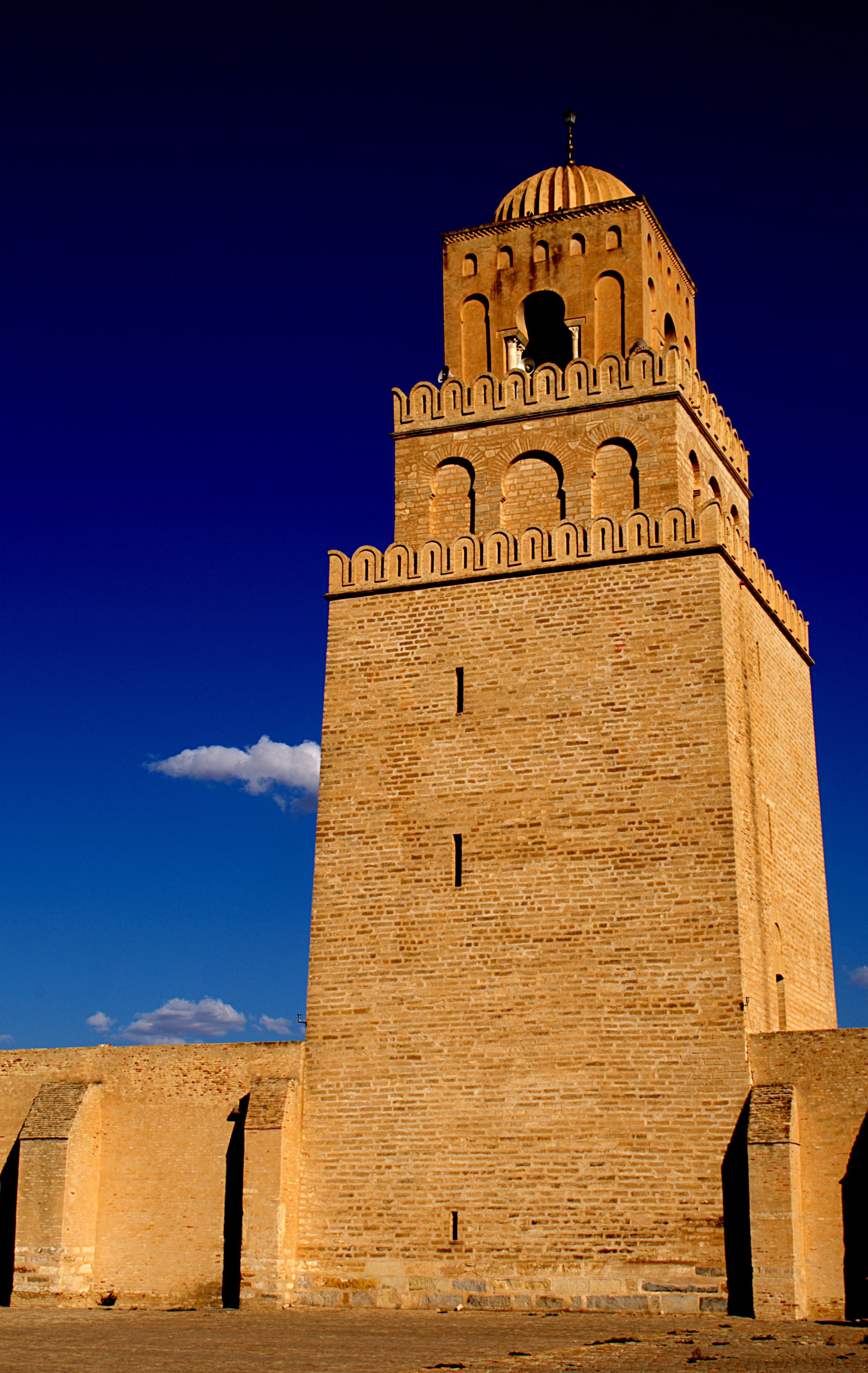 Grande Mosquée (Sidi Okba), Kairouan